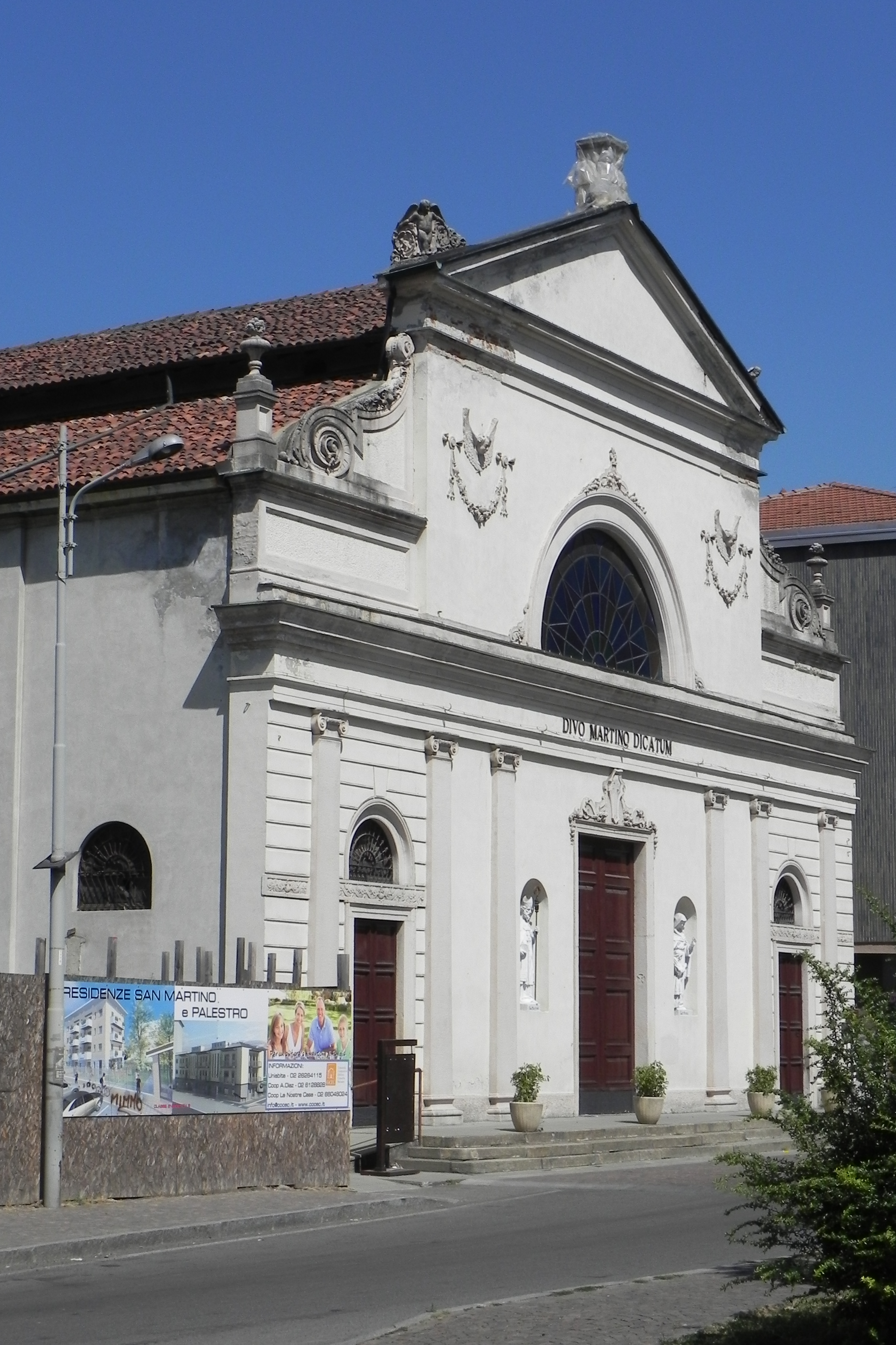 Facciata del Santuario di San Martino in Balsamo.